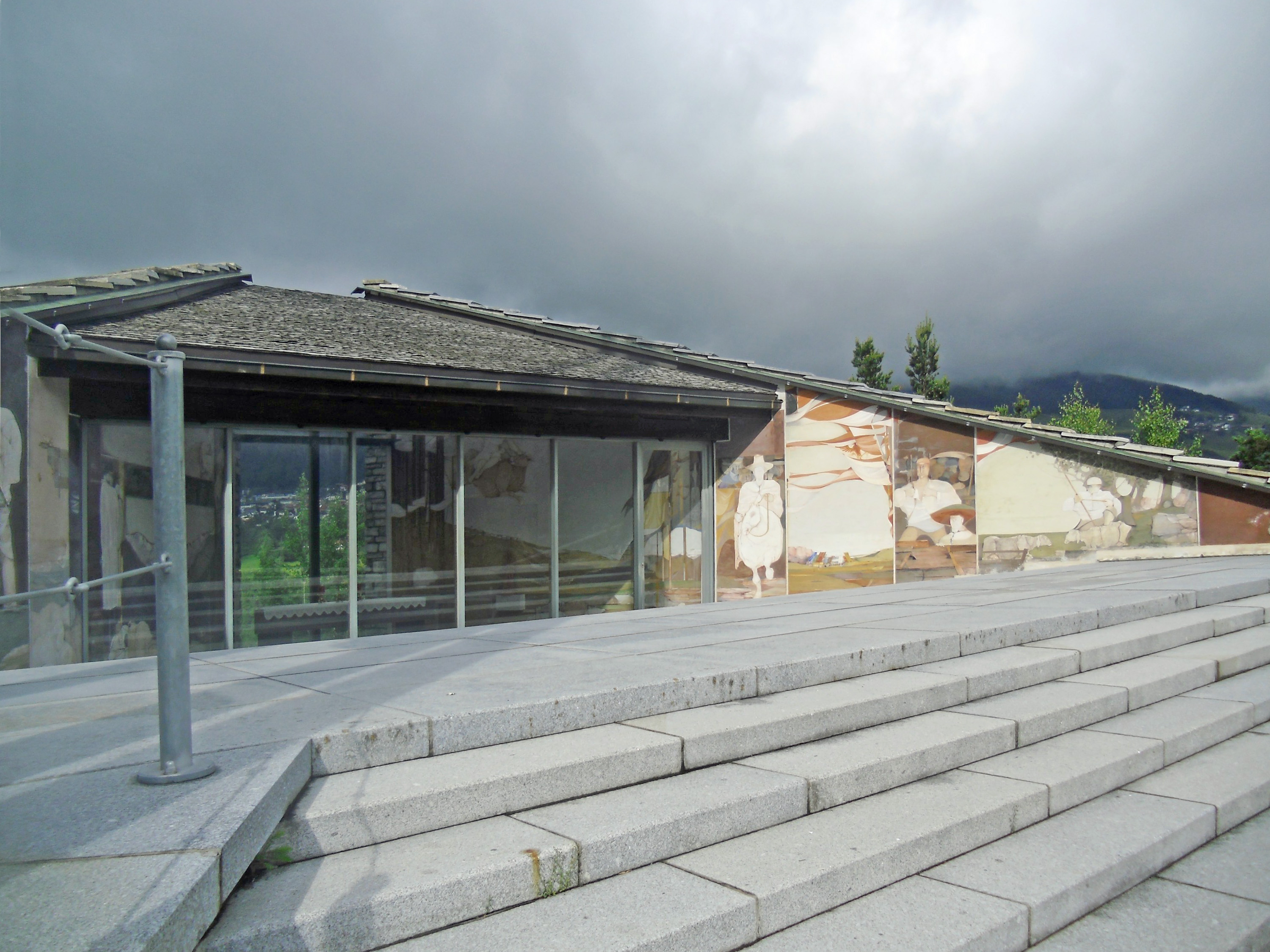 Europa-Kapelle